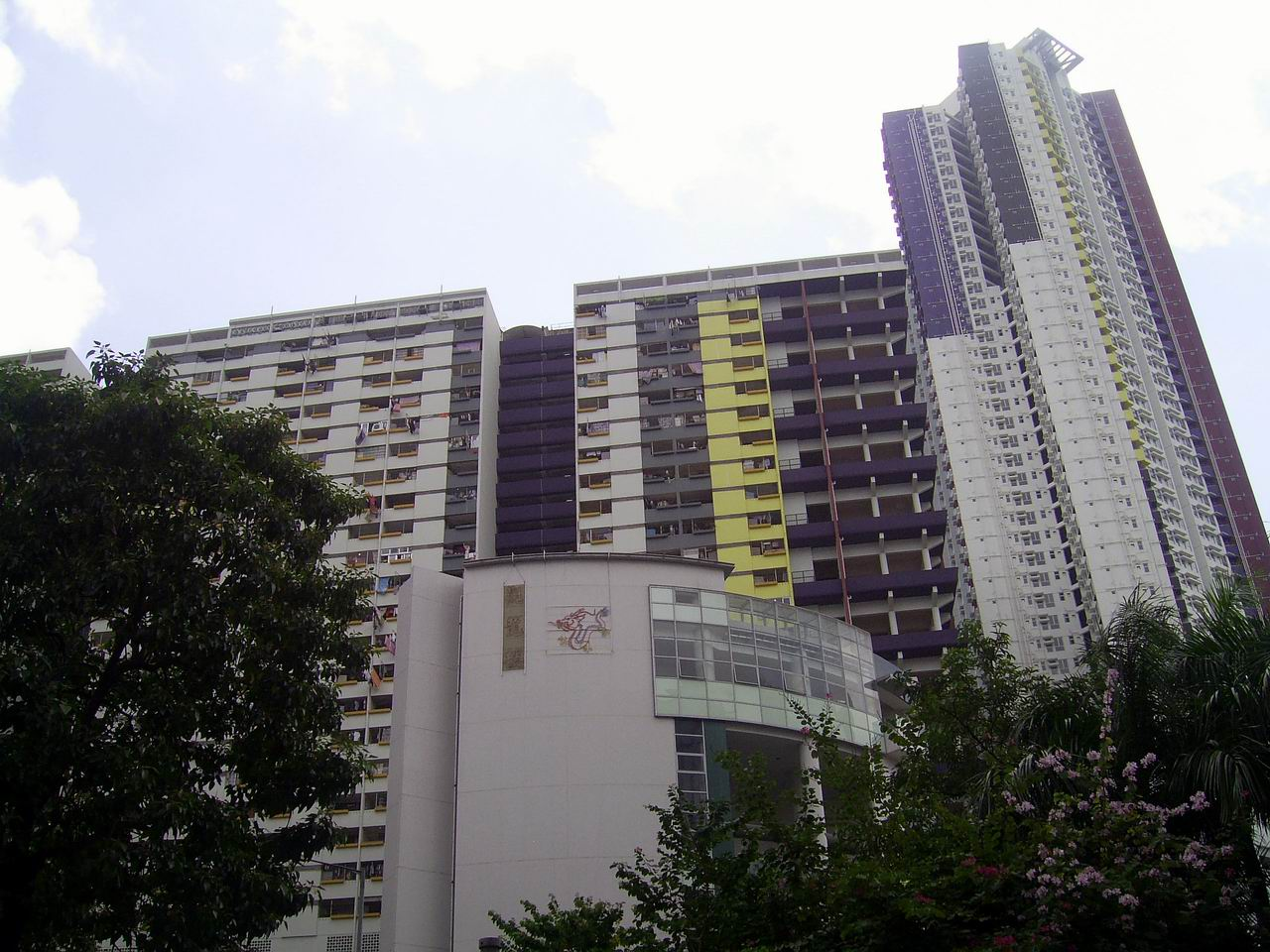 觀龍樓